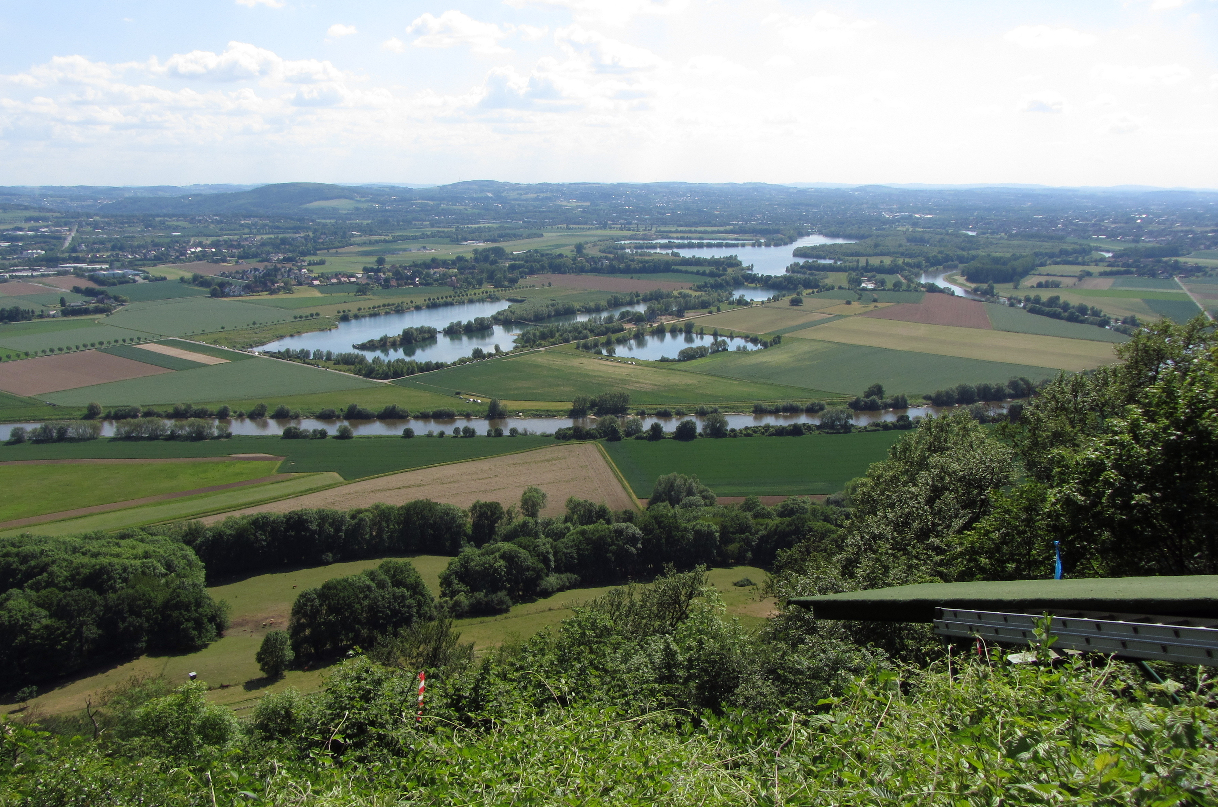 Porta Westfalica. Blick von der Wittekindsburg (Wiehengebirge) auf die Weser und die Seenlandschaft "Großer Weserbogen". Im Hintergrund der Mittlere See (größter See). Es handelt sich um künstliche Seen, entstanden durch Kiesabbau.